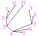 Creado por Romero Schmidtke, para la Enciclopedia Libre